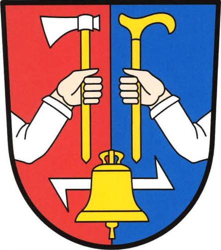 Čakov, okres Benešov, znak